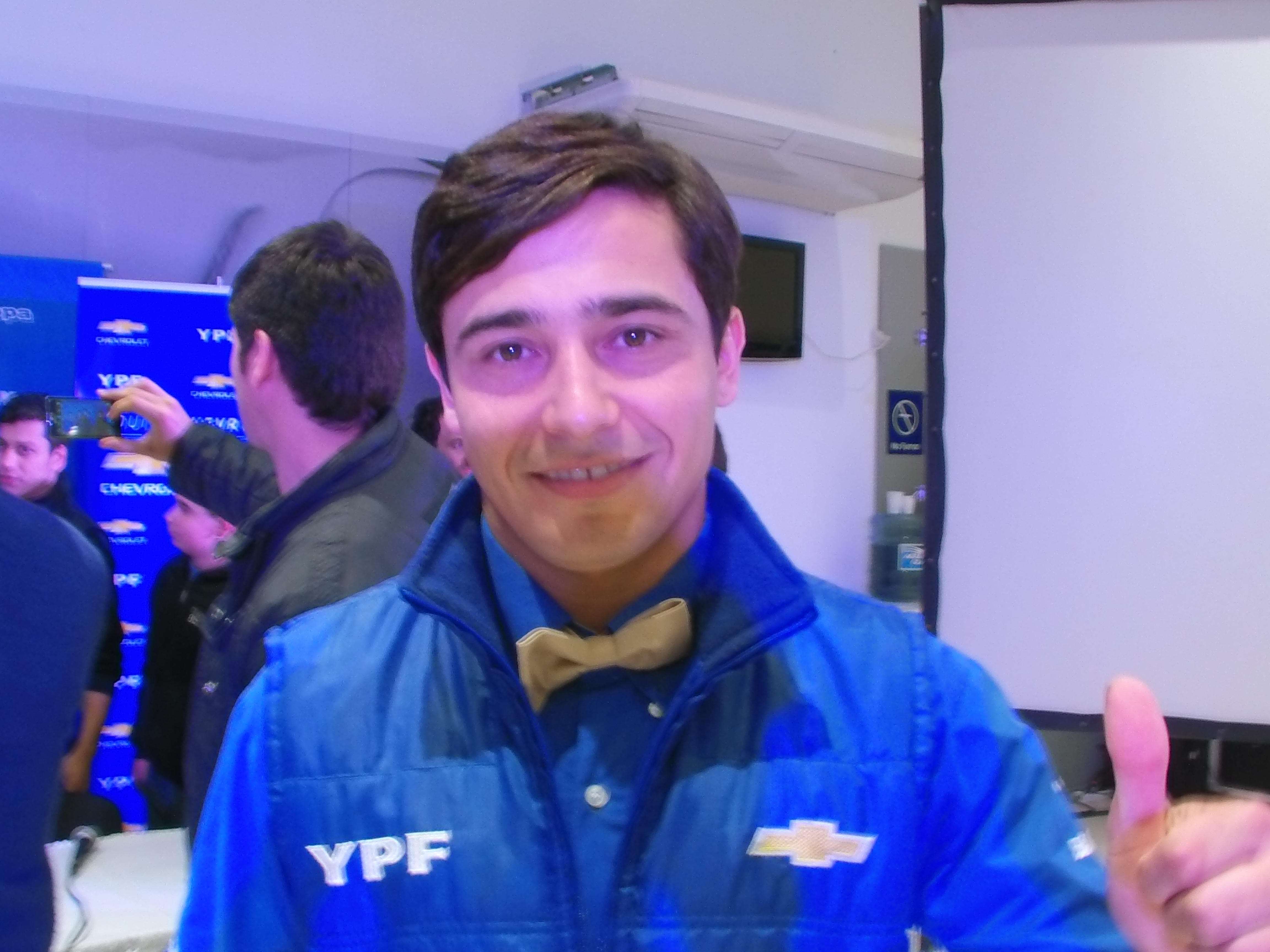 Matias Milla, piloto argentino de automovilismo de velocidad, campeón 2013 del Turismo Competición 2000